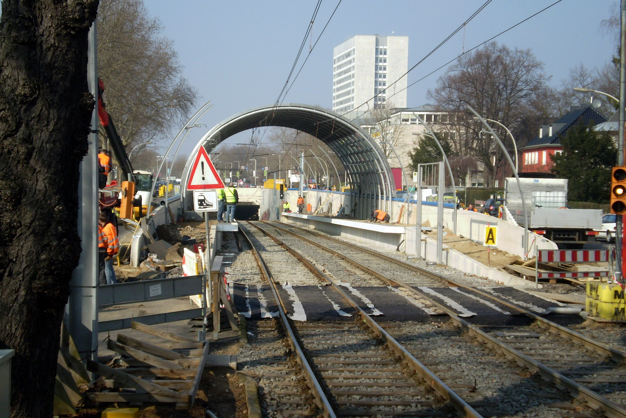 Neue Stadtbahnhaltestelle Deutsche Telekom – Ollenhauerstraße im Bau, Gronau, Bonn